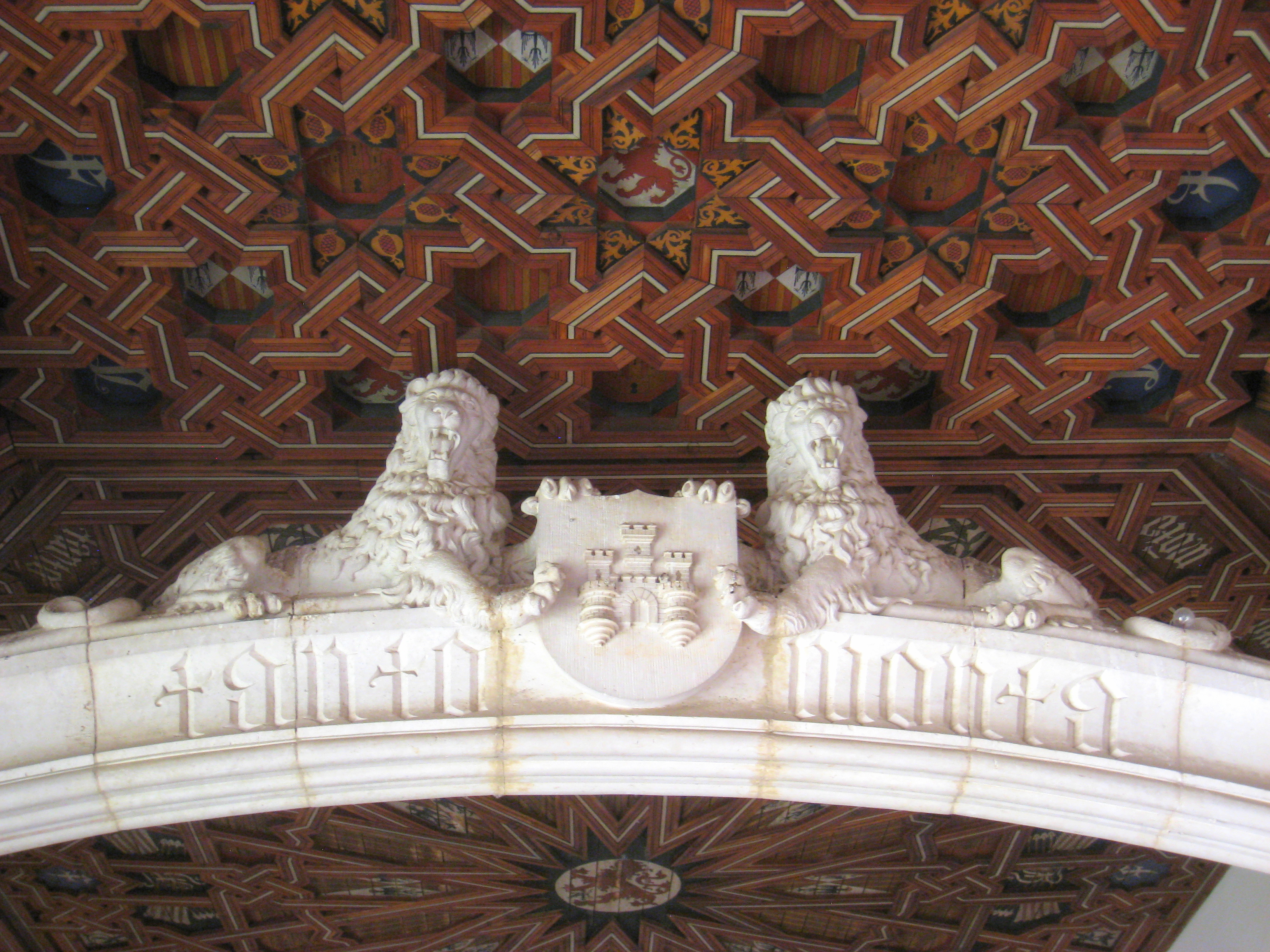 San Juan de los Reyes, Toledo, Spain.